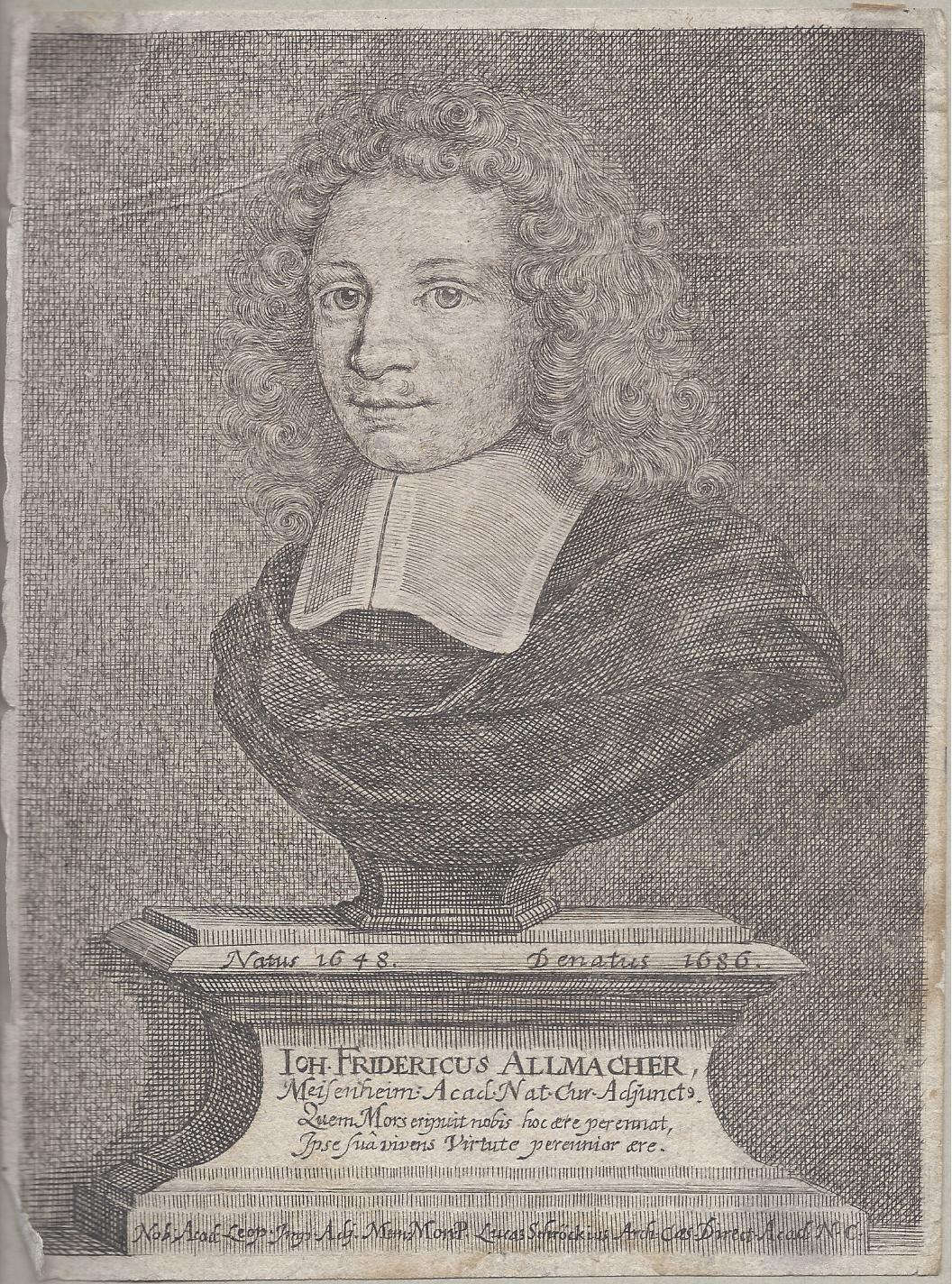 Johann Friedrich Allmacher 1648-1686, Widmungsblatt von Johann Christoph Sartorius 1730.